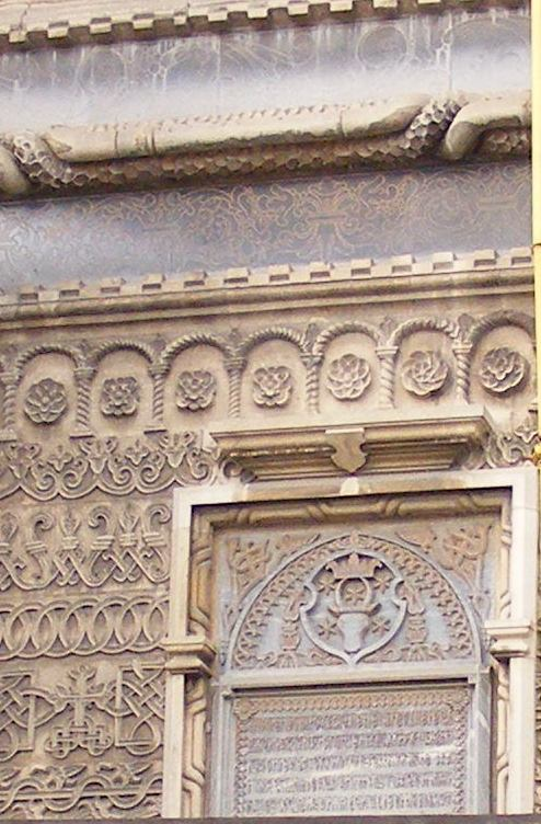 Pisania bisericii "Trei Ierarhi" din Iasi si detalii de sculptura exterioara (2009)